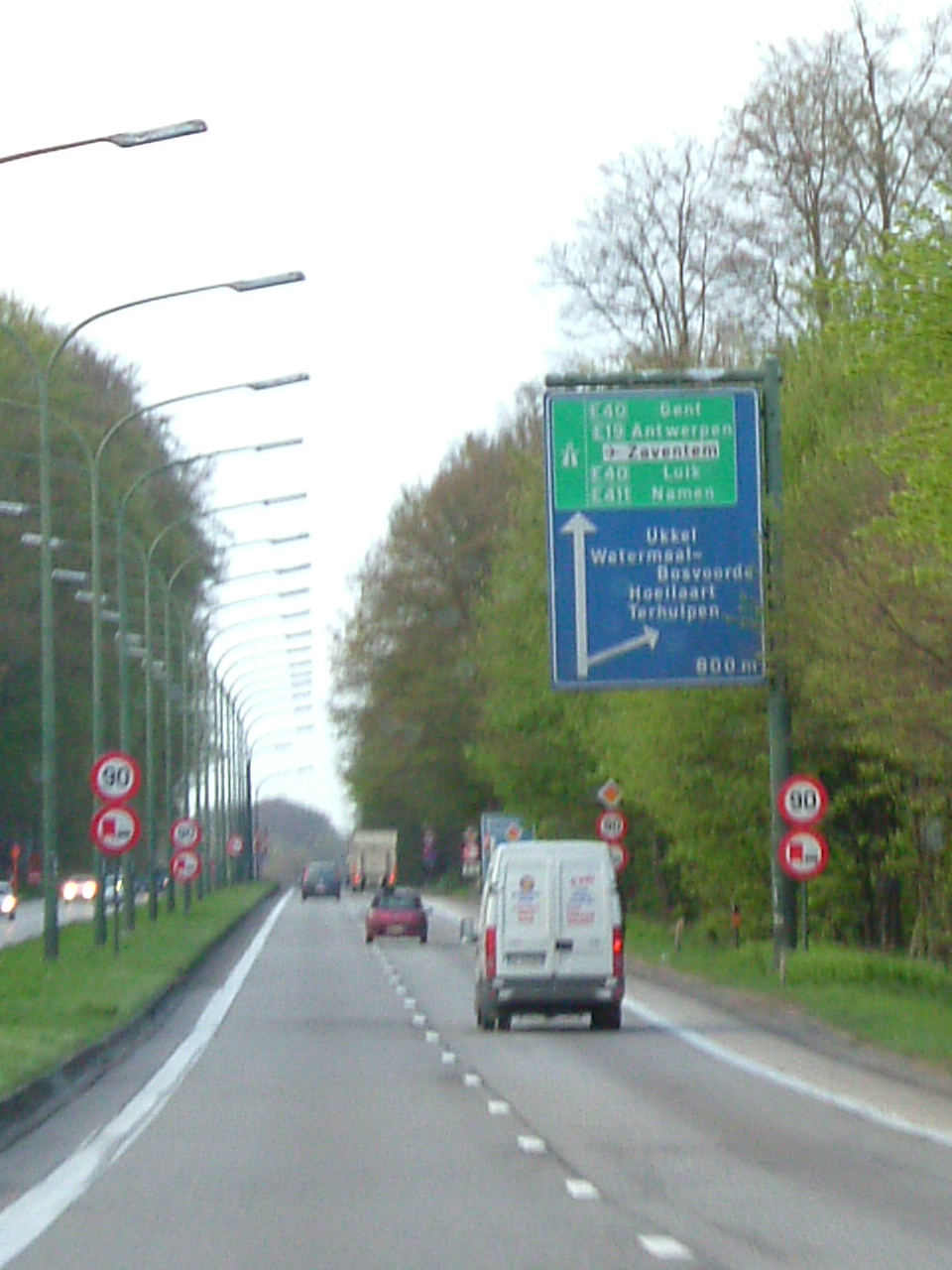 "Sortie" du ring de Bruxelles vers uccle Texte du panneau E40 Gand E19 Anvers Aéroport de Zaventem E40 Liège E411 Namur /\ || || Uccle || Watermael-Boisfort || Hoeilaart || _ La Hulpe || //| ||// ||/ Crée moi même Pypaertv16pxMail